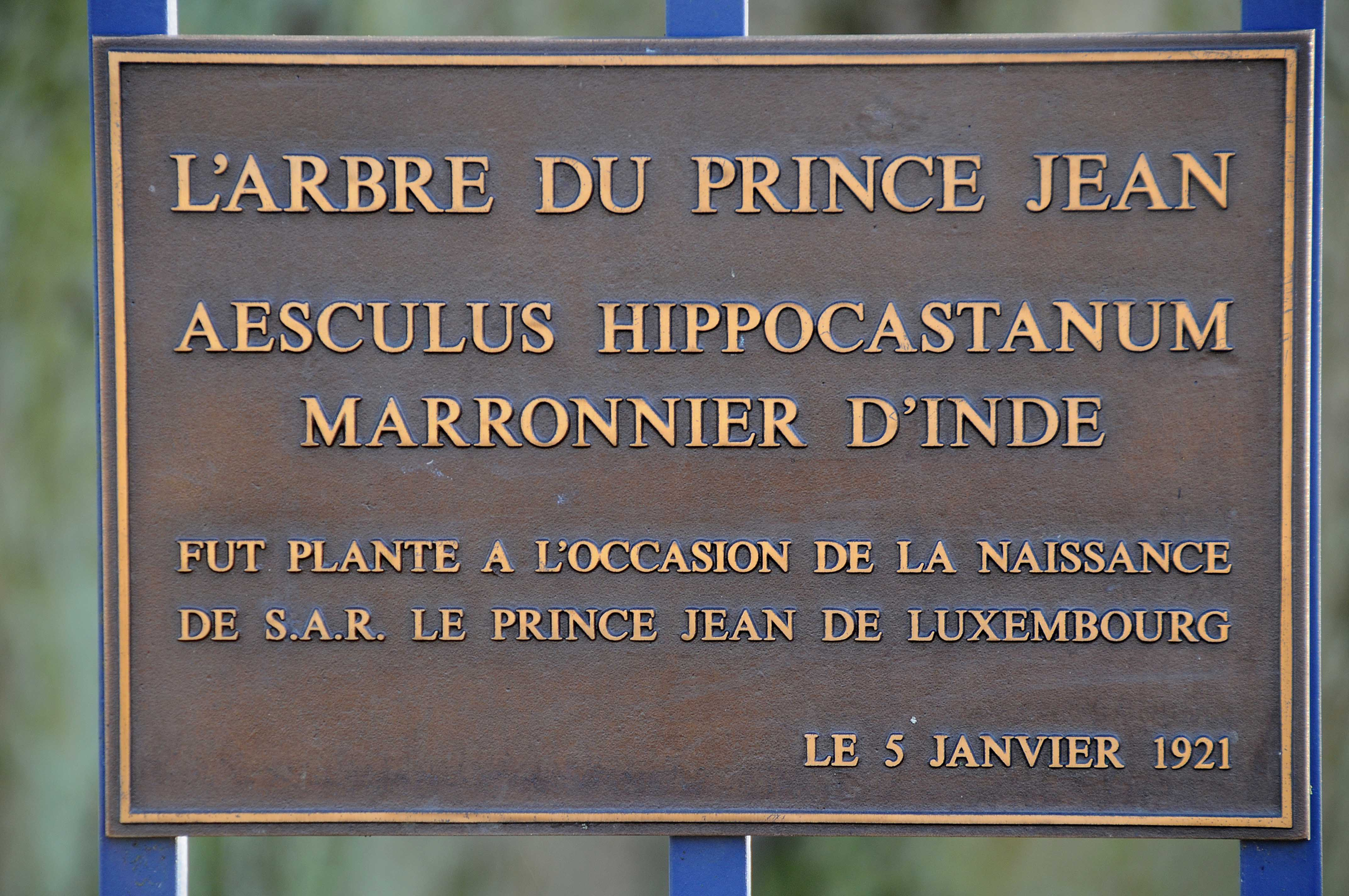 Plaquette um Bam vum Prënz Jean